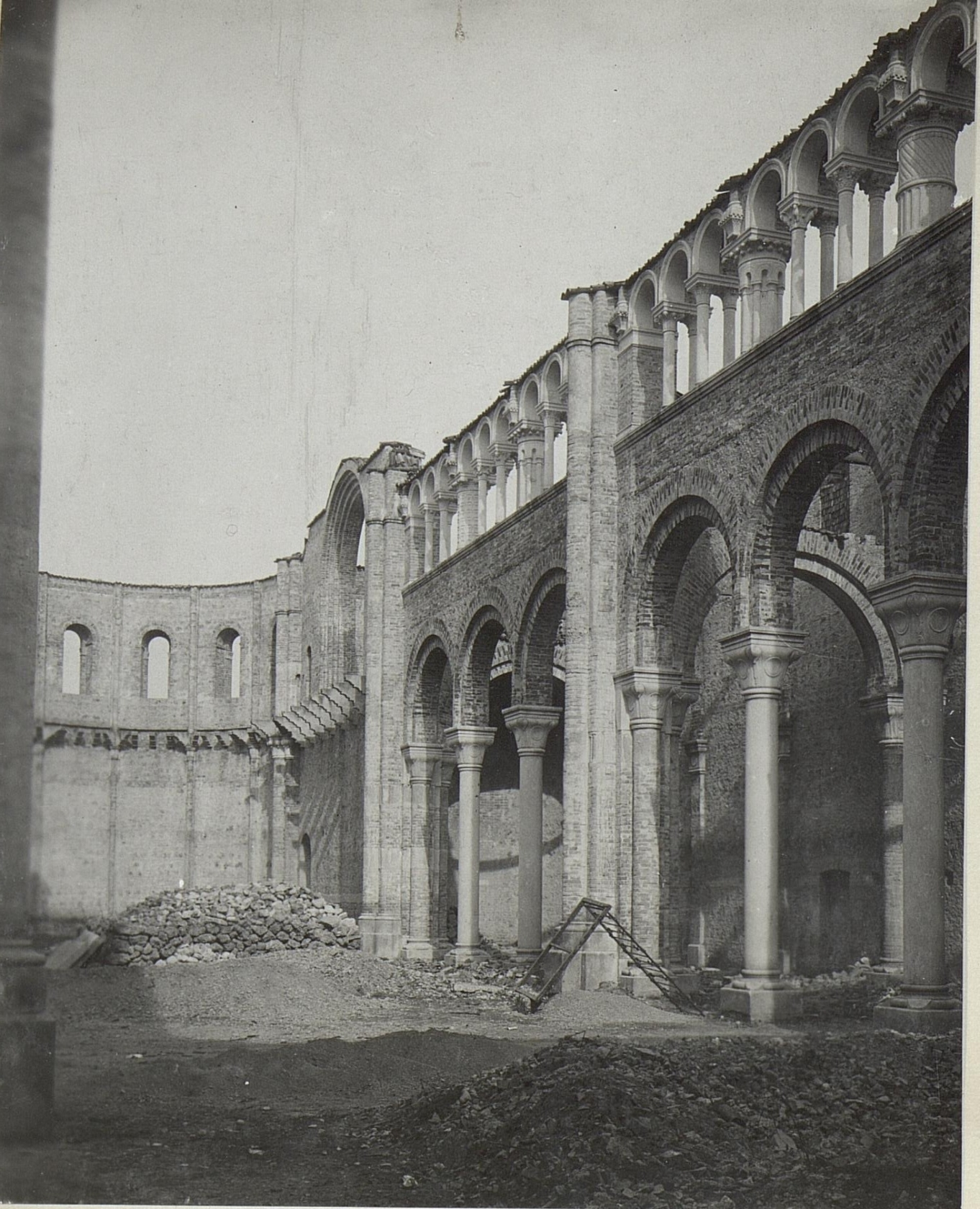 Soligho, neue Kirche.